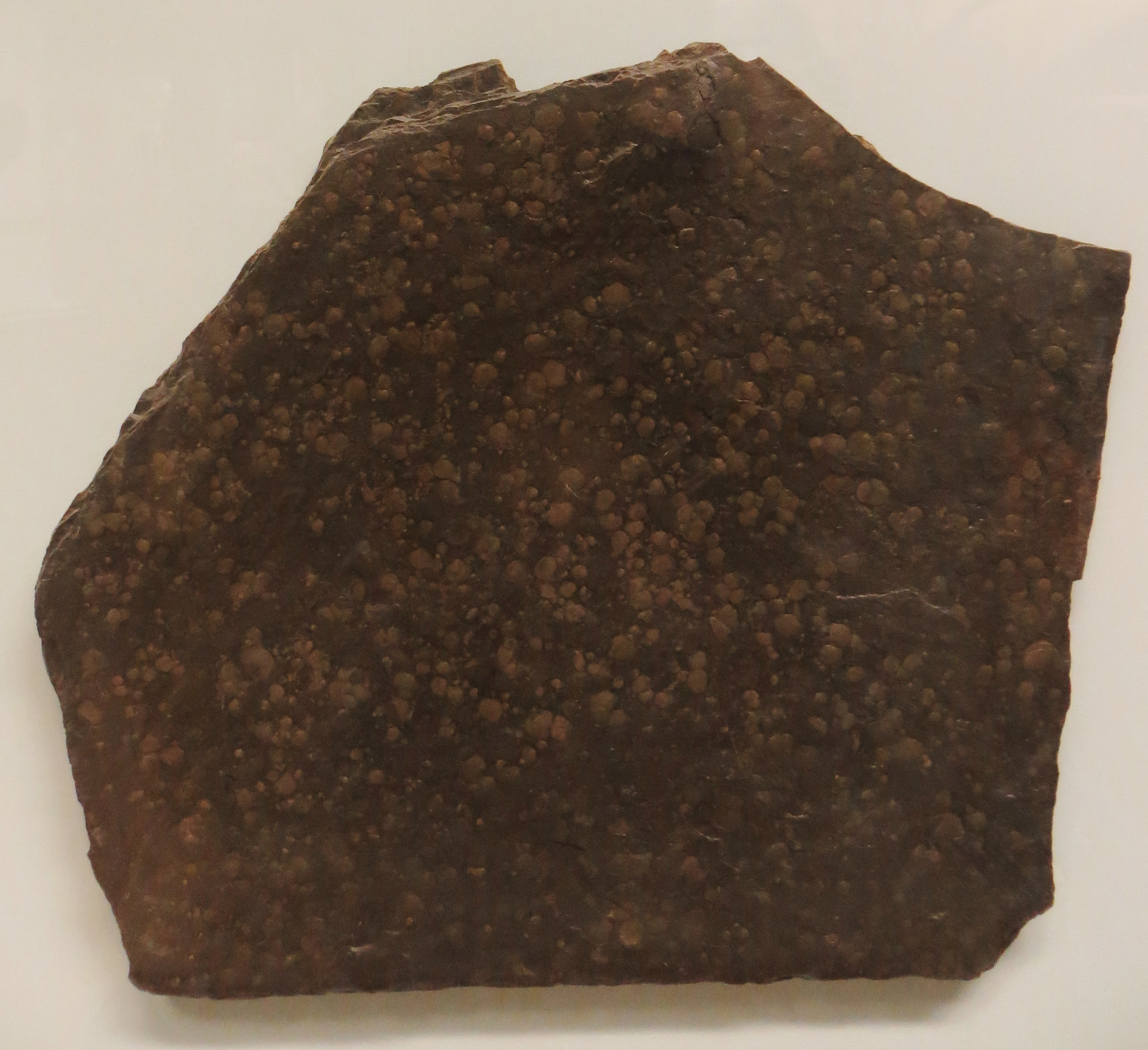 Fossil of Bositra- Took the picture at Museum am Lowentor, Stuttgard